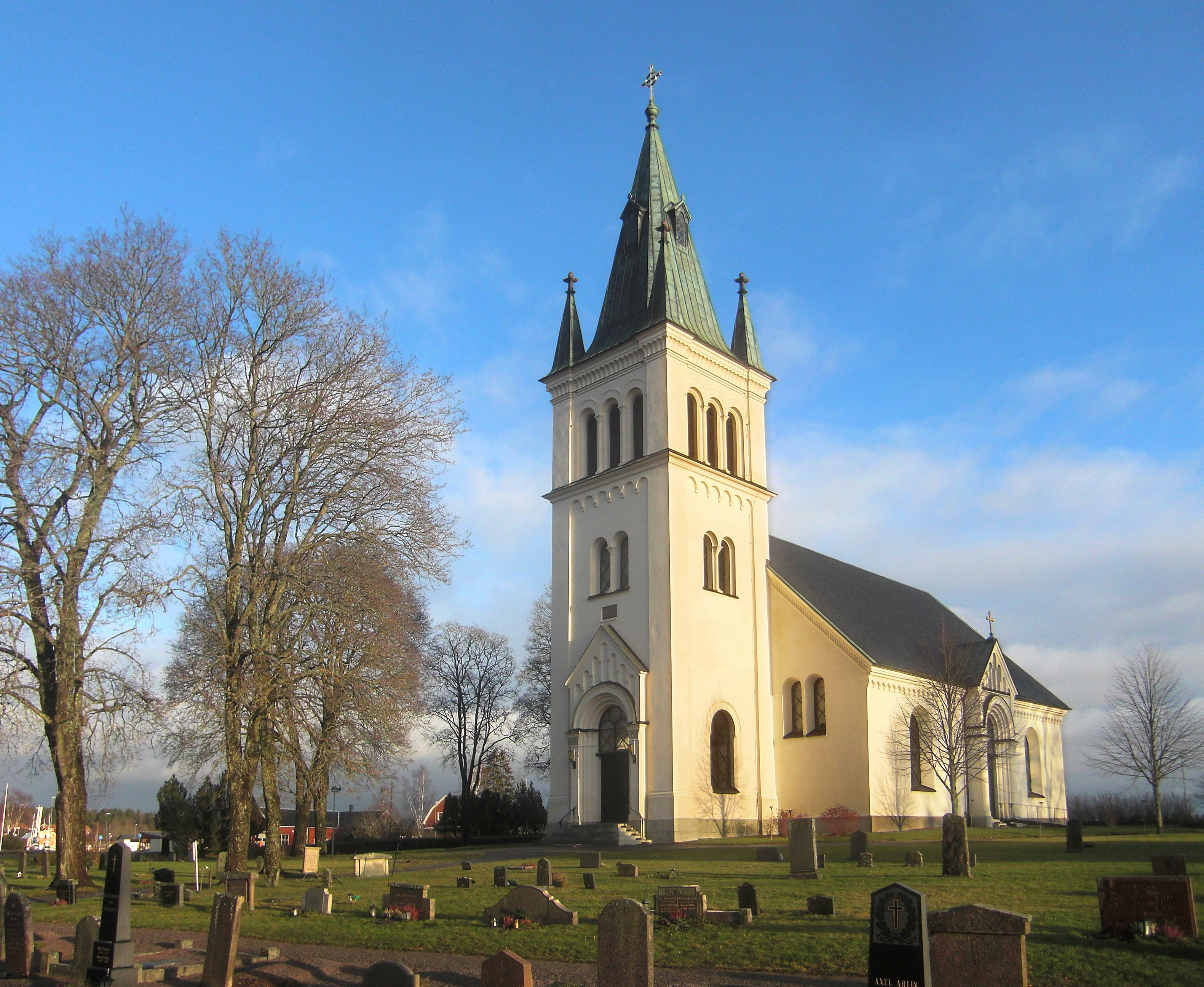 Norrby kyrka i Sala kommun, Uppland, Sverige.